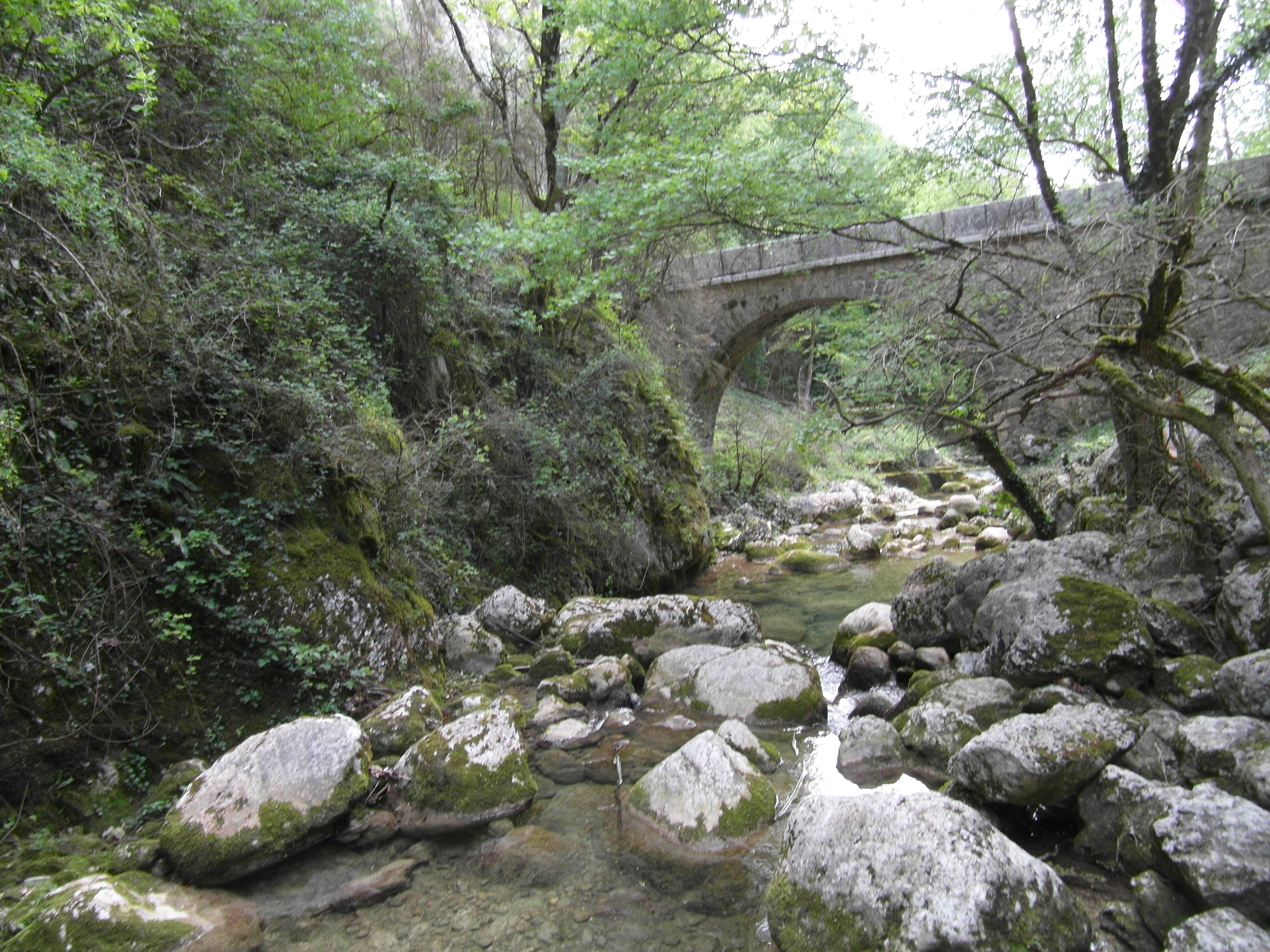 le pont de Montchardon dans les gorges du nan.